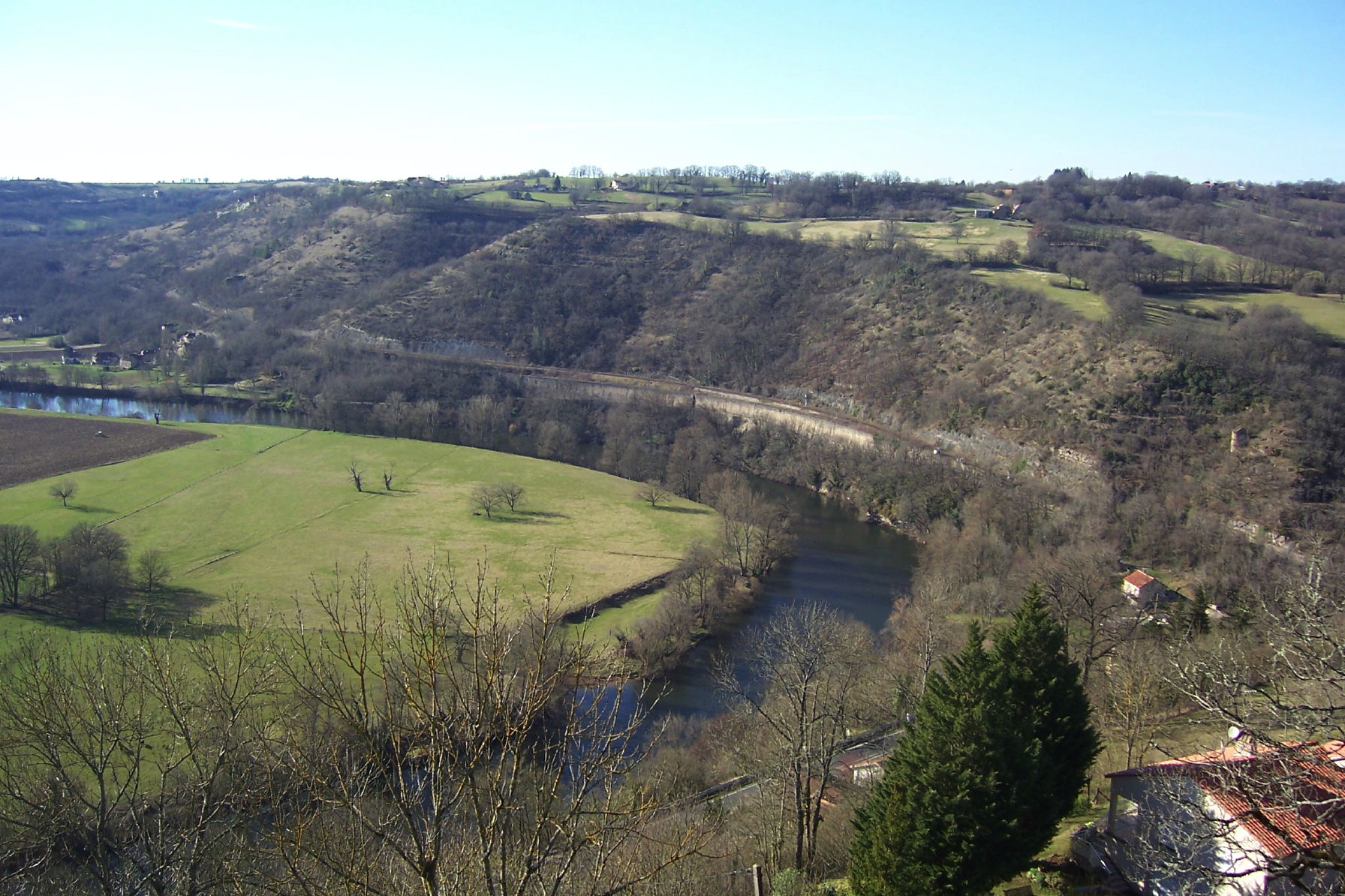 Vue sur la rivière Lot en amont depuis Capdenac-le-Haut